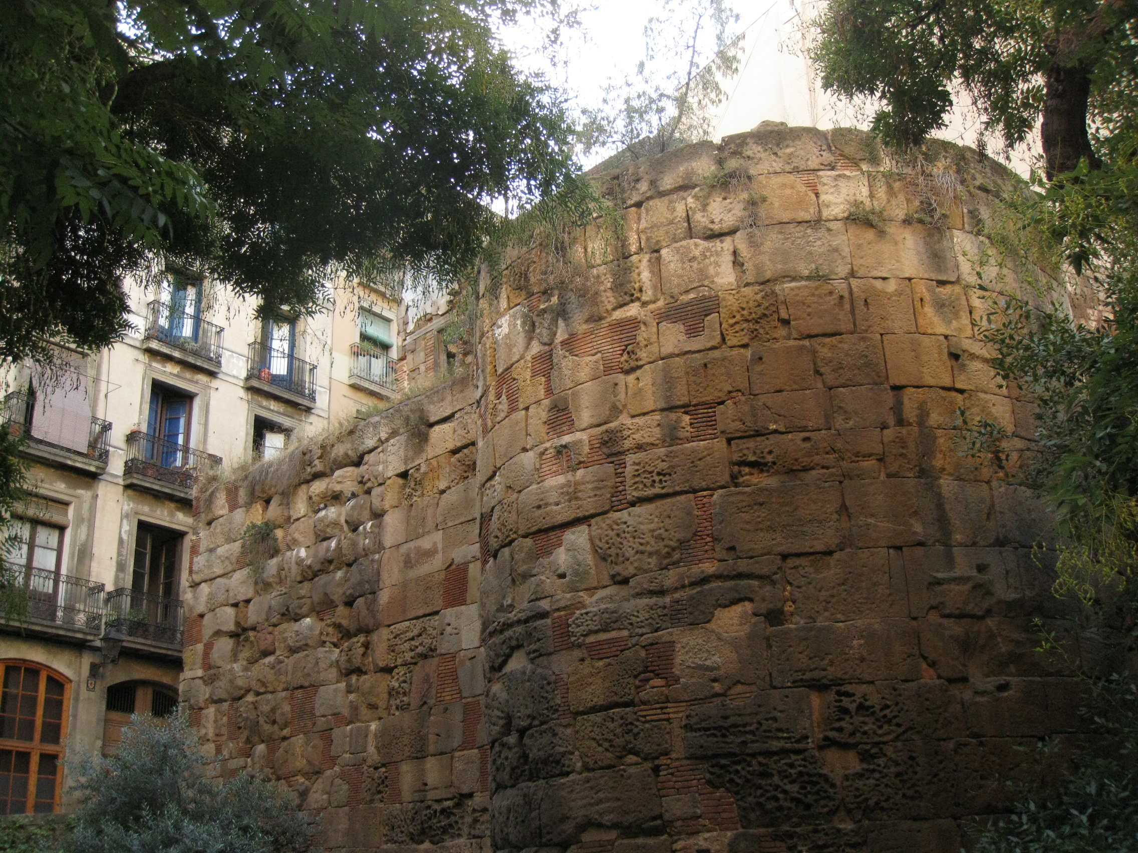 Torre i restes de la muralla romana, a la cantonada entre la Baixada de Viladecols i la plaça dels Traginers, al barri Gòtic de Barcelona.